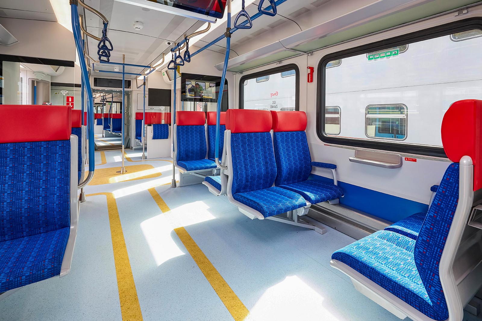 Пассажирский салон электропоезда ЭГ2Тв-027 «Иволга». Центральная часть головного вагона